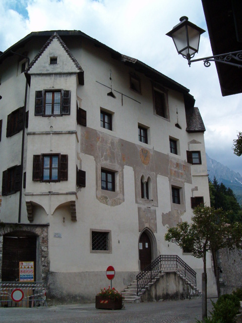 Palazzo Del Dazio, Fiera di Primiero, Trentino, Italy